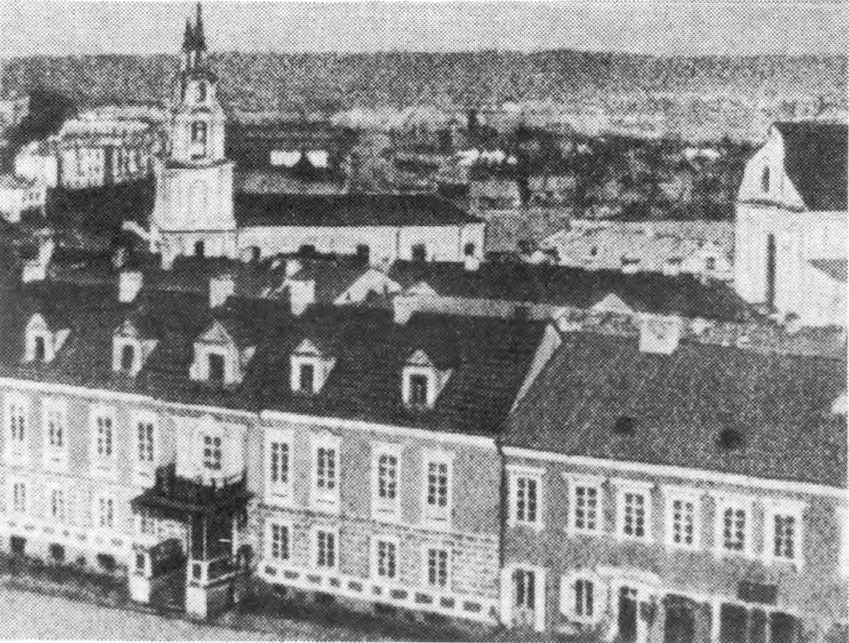 Беларуская (тарашкевіца): Менск (Miensk), Высокае Места (Vysokaje Miesta). Квартал у раёне пляцу Высокага Рынку (plac Vysoki Rynak) і вуліцы Вялікай Бэрнардынскай (vulica Vialikaja Bernardynskaja). Гасьціны Двор (Haściny Dvor), жаночы і мужчынскі бэрнардынскія кляштары